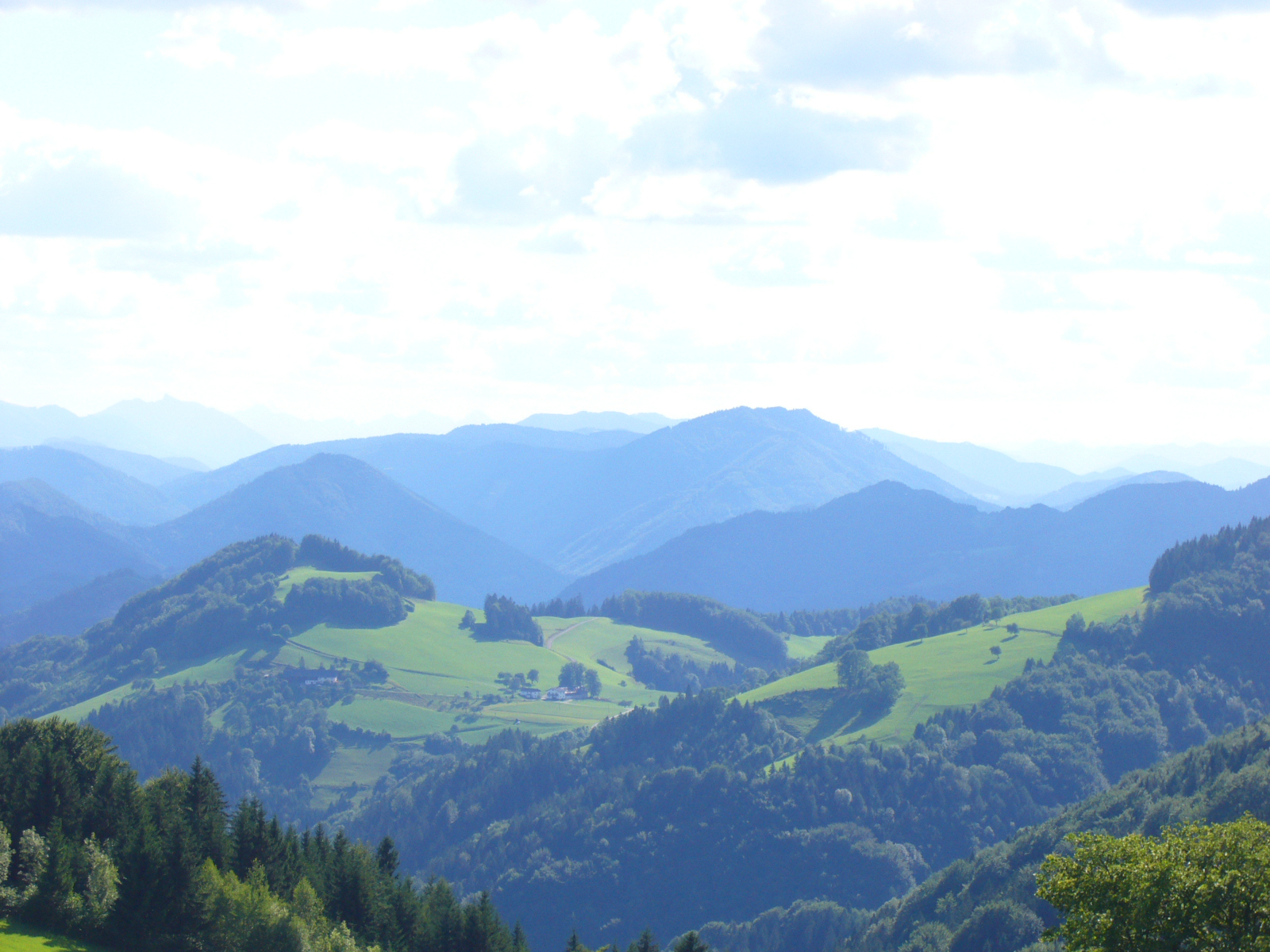 the eisenwurzen in lower austria